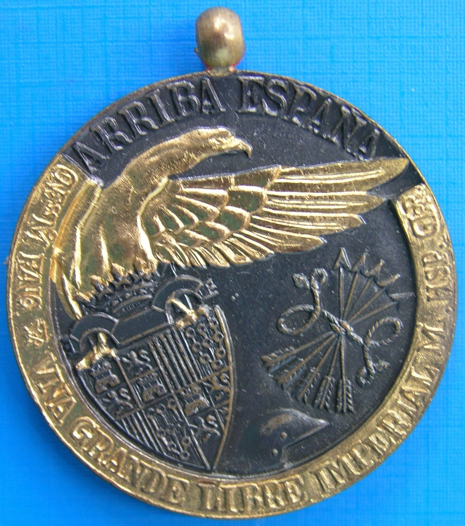 Medalla acuñada por los vencedores al terminar la Guerra Civil Española. Le falta la cinta para colgar. Inscripción: Arriba España. Generalísimo Franco «Víctor» (Emblema de «Víctor») Una Grande Libre Imperial M. HSP. Glor. También aparecen el escudo de España, el águila de San Juan y el yugo y las flechas.